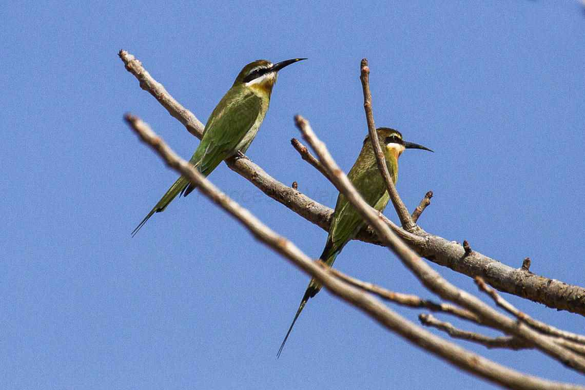 Madagascar Bee-eater - Ifaty - Madagascar_MG_1537